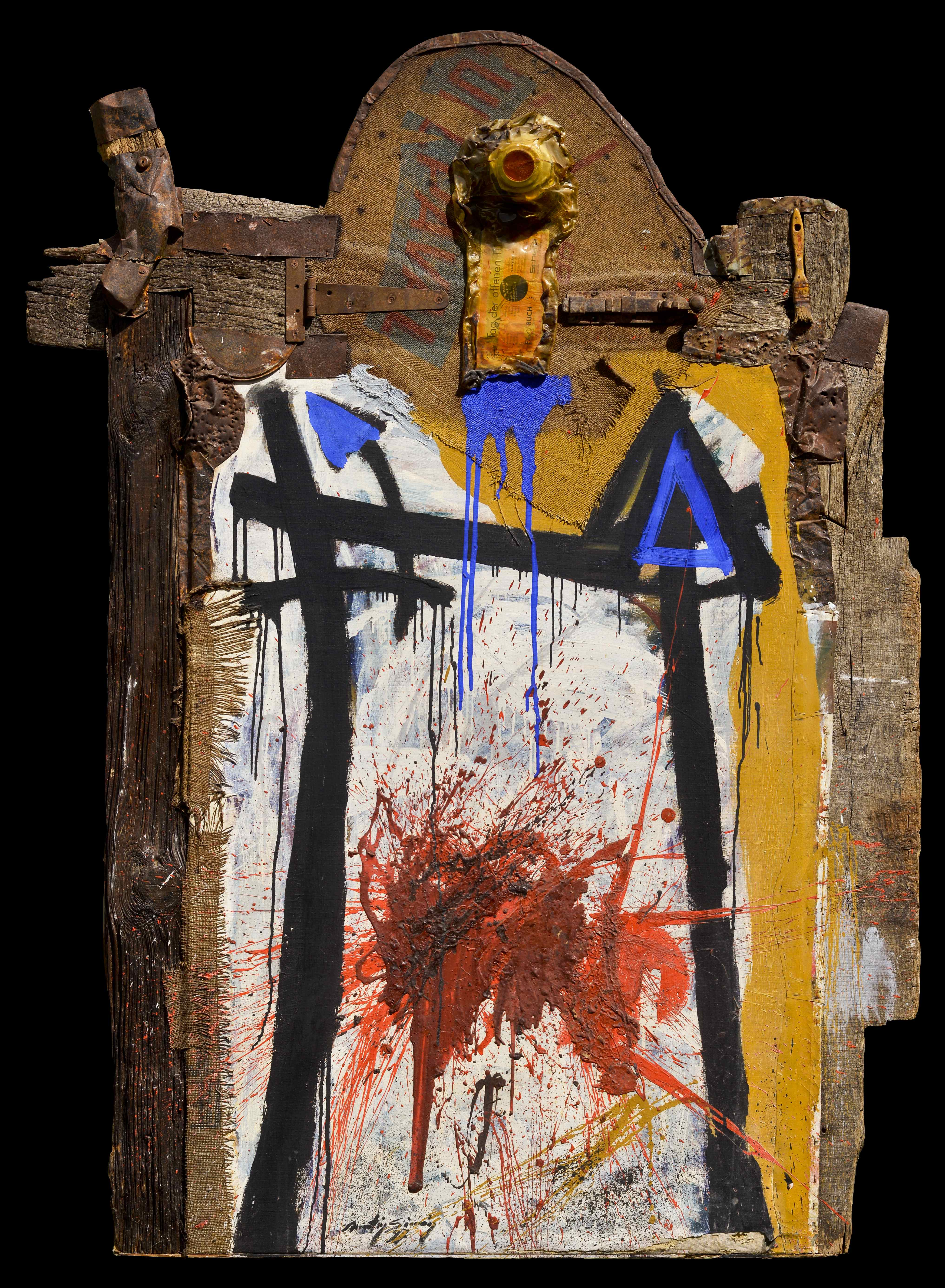 Che Guevara dos